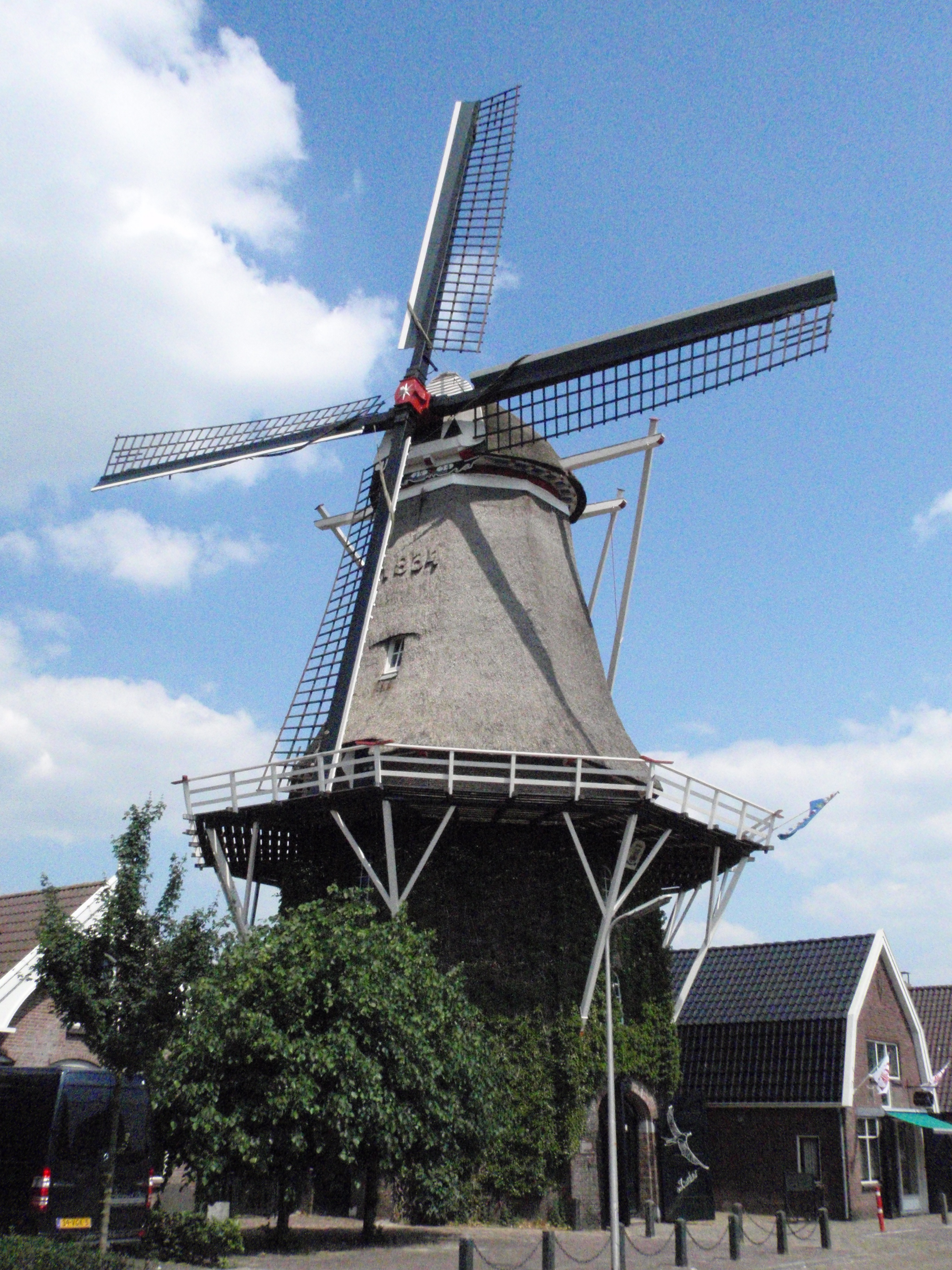 Molen De Zwaluw te Hoogeveen